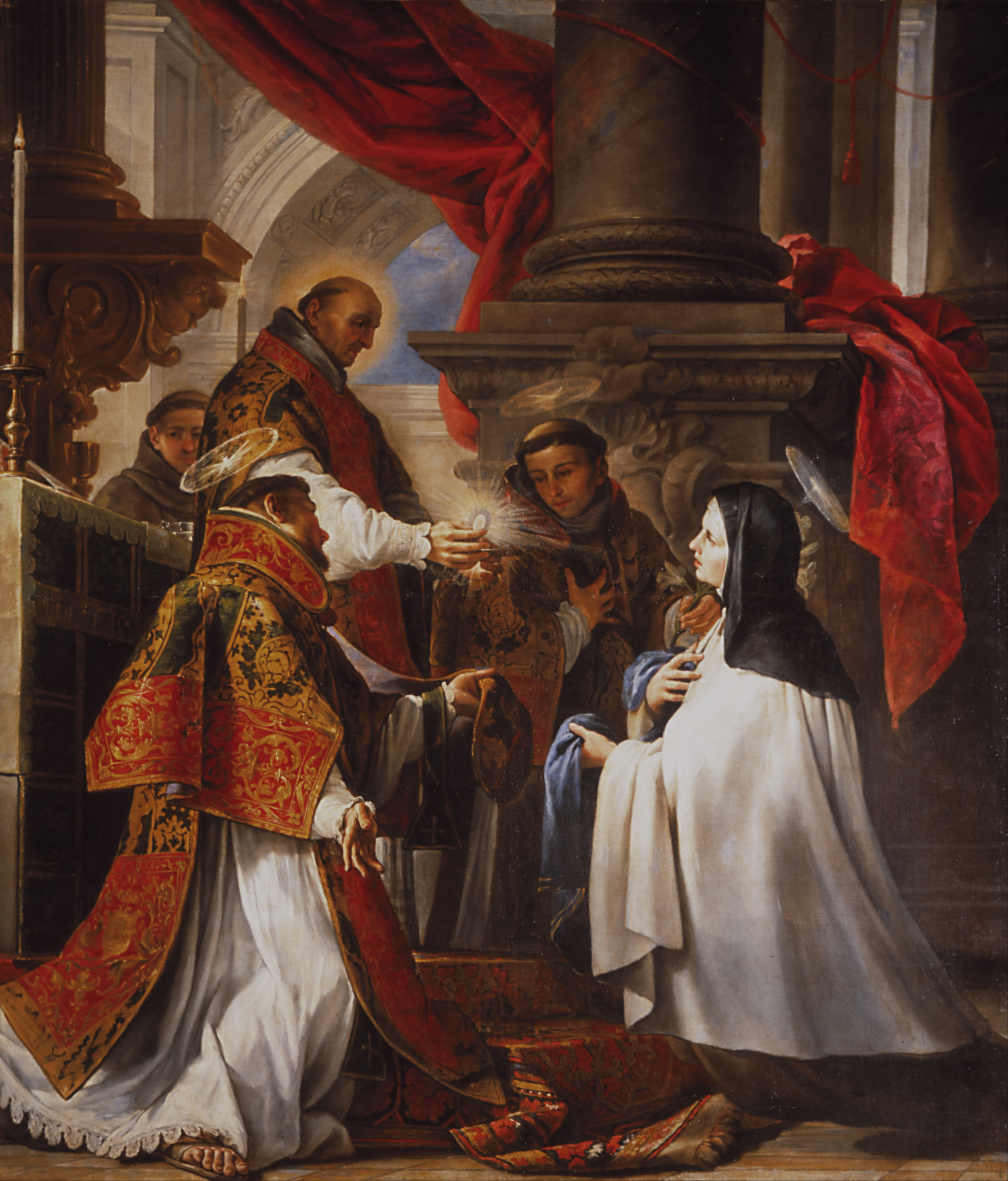 El lienzo muestra a Santa Teresa de Jesús (1515-1582), recibiendo la sagrada comnión de manos de un sacerdote.